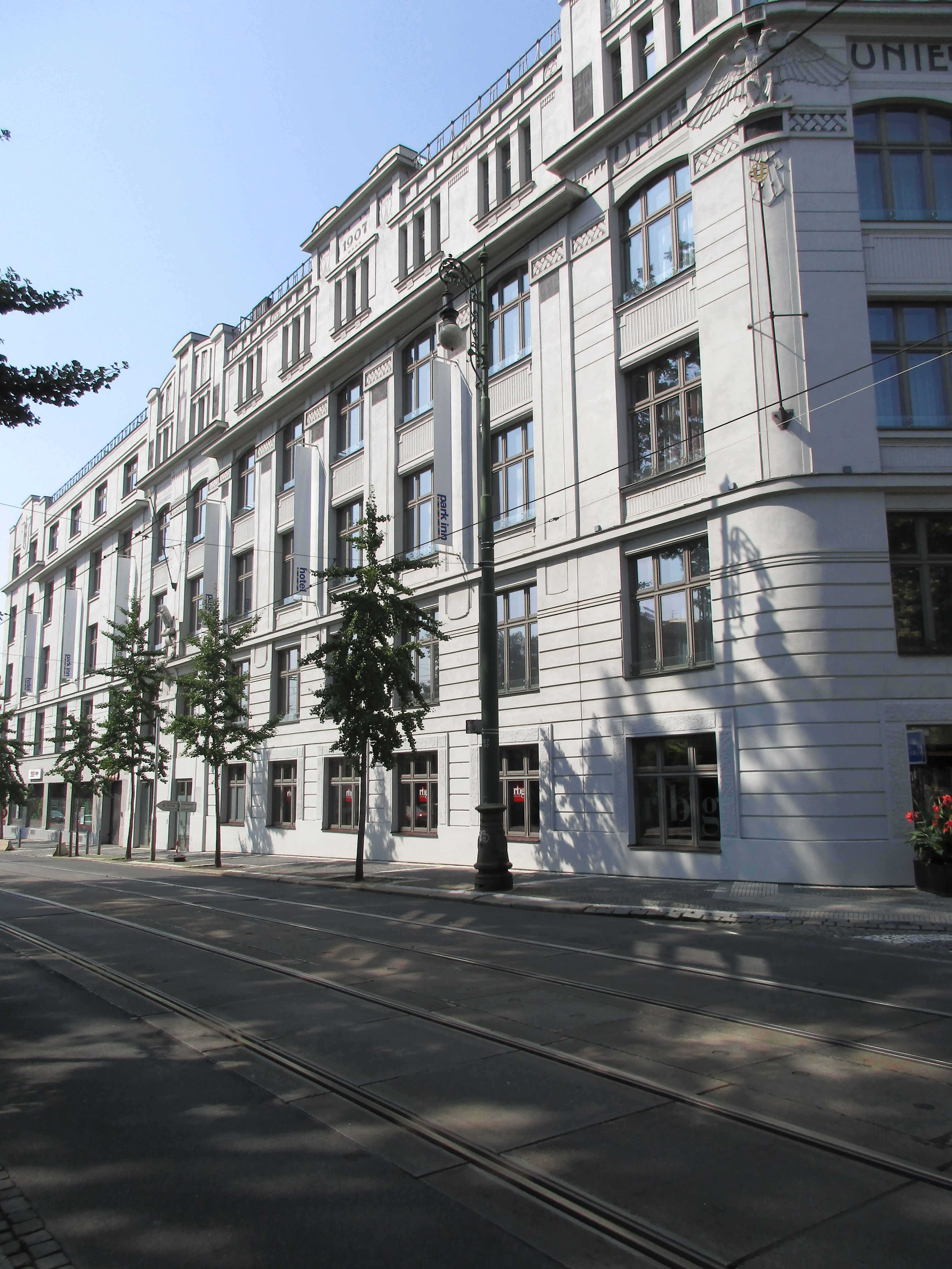 Česká grafická unie.